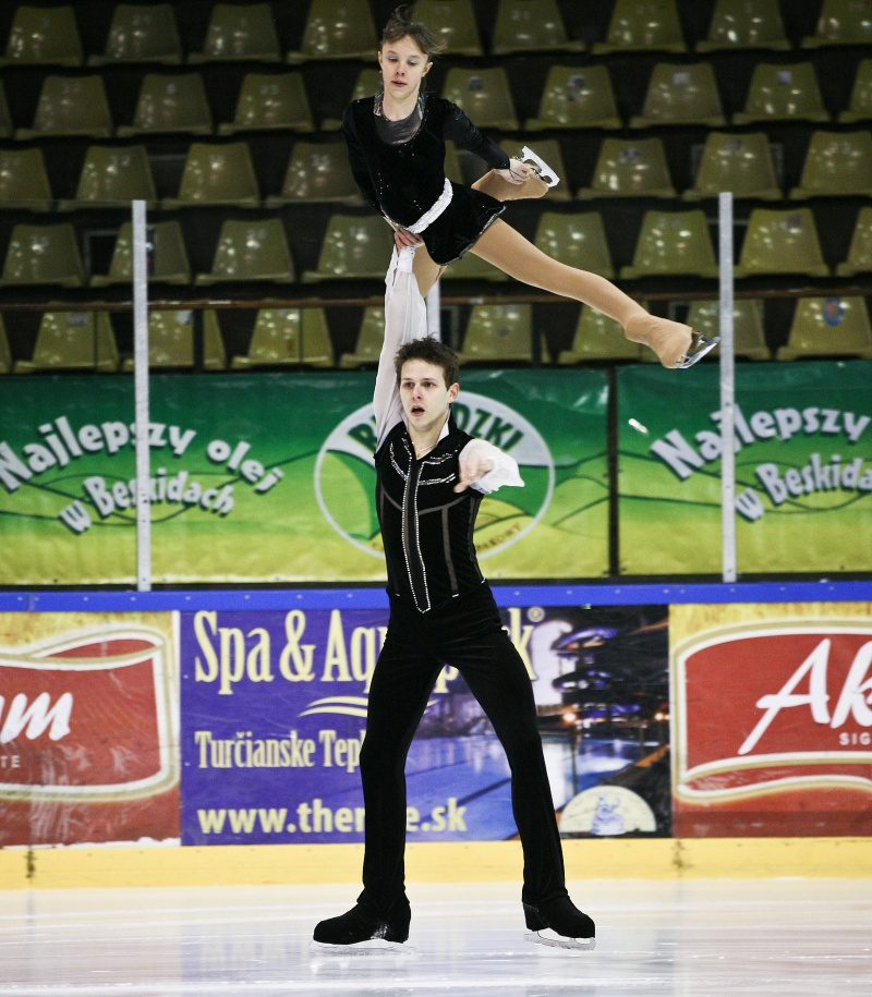 Magdalena Jaskółka i Piotr Snopek podczas Mistrzostw Polski Juniorów 2011.